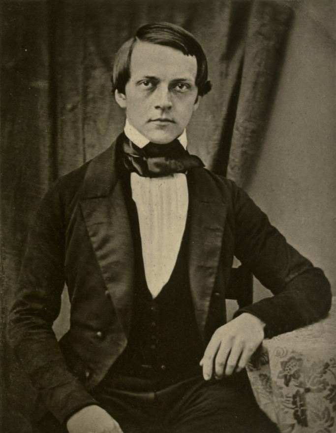 Hermann von Helmholtz in 1848, daguerrotype